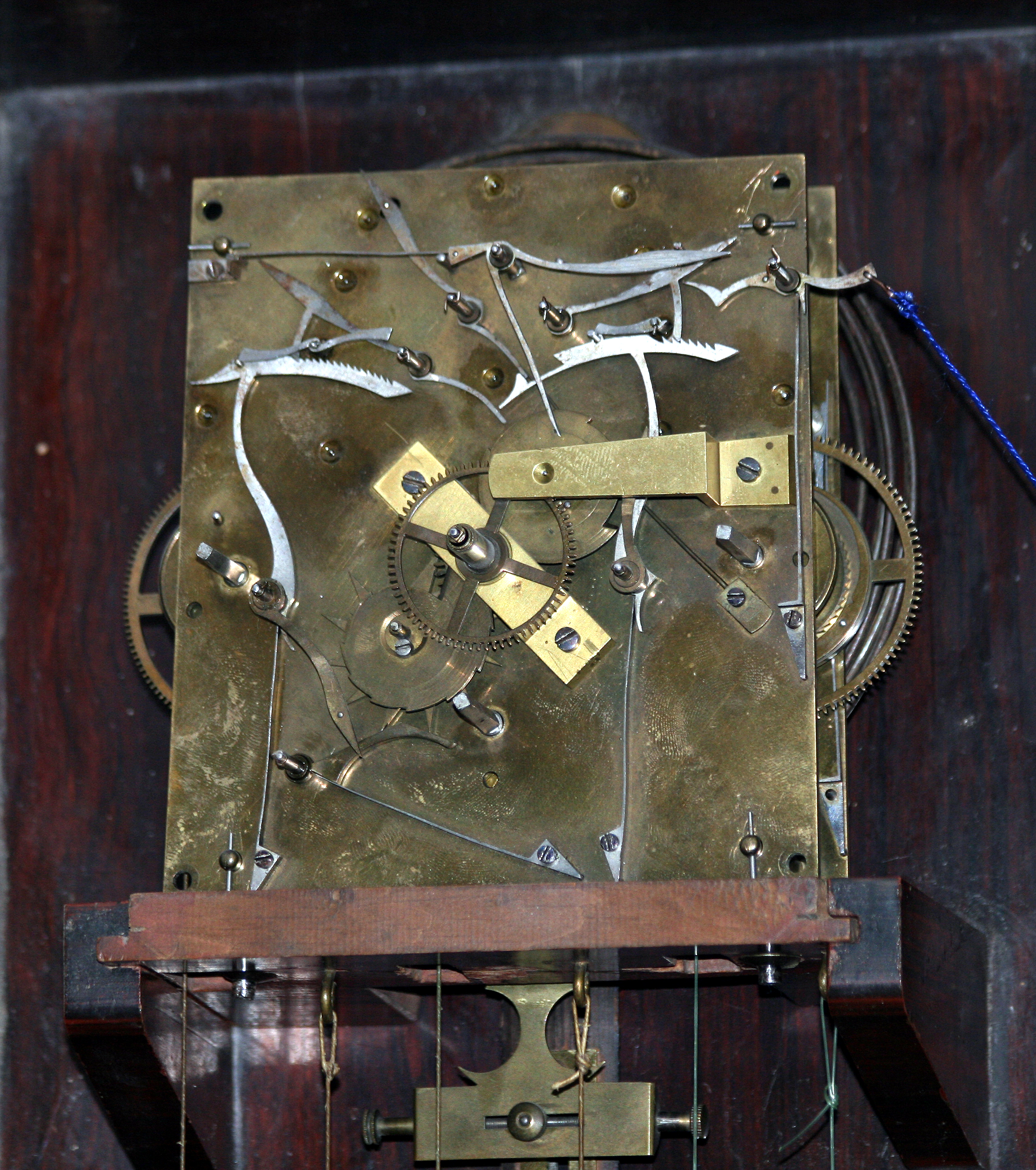 Rechenschlagwerk, Wiener Schlag um 1870